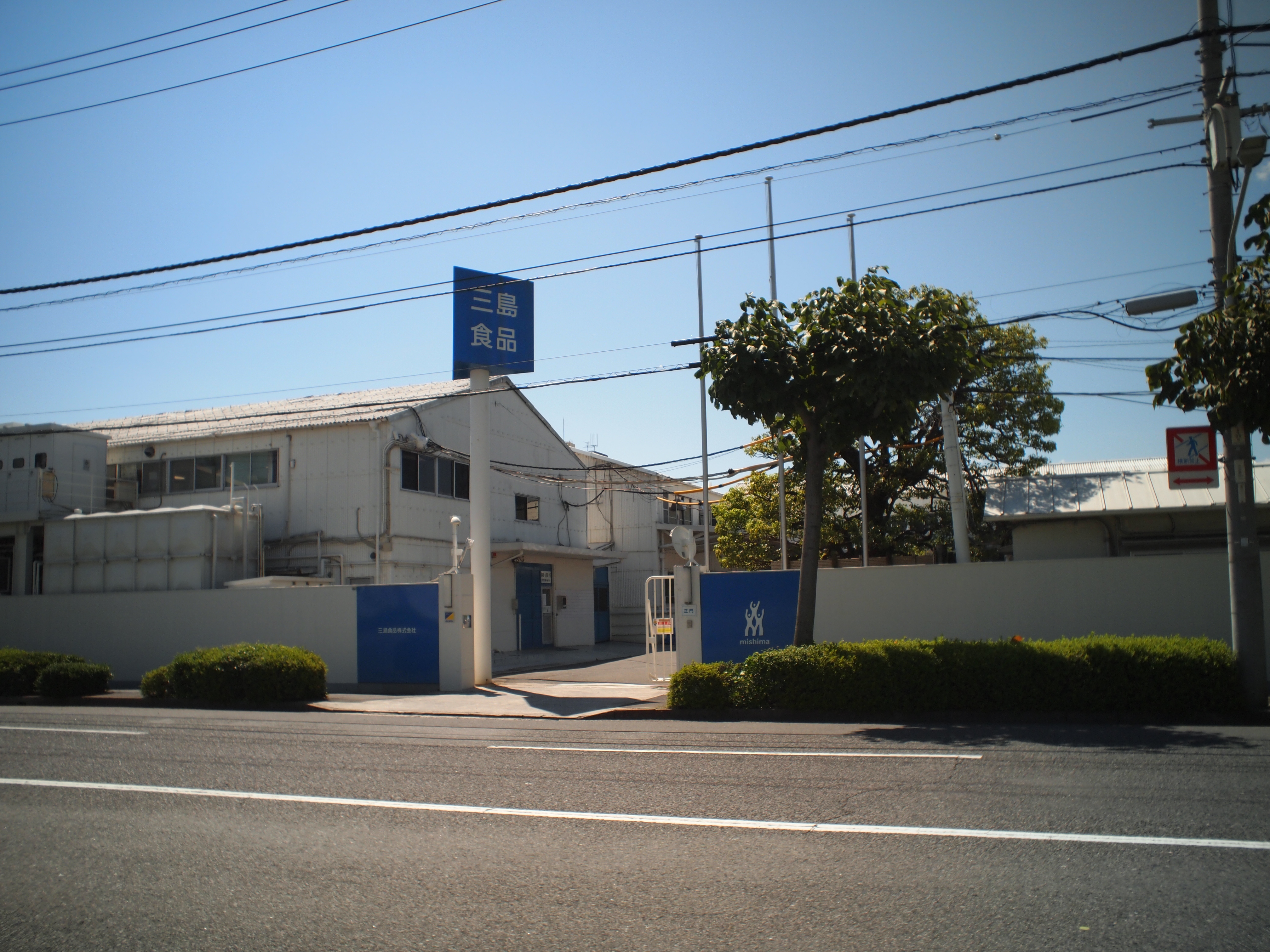 三島食品